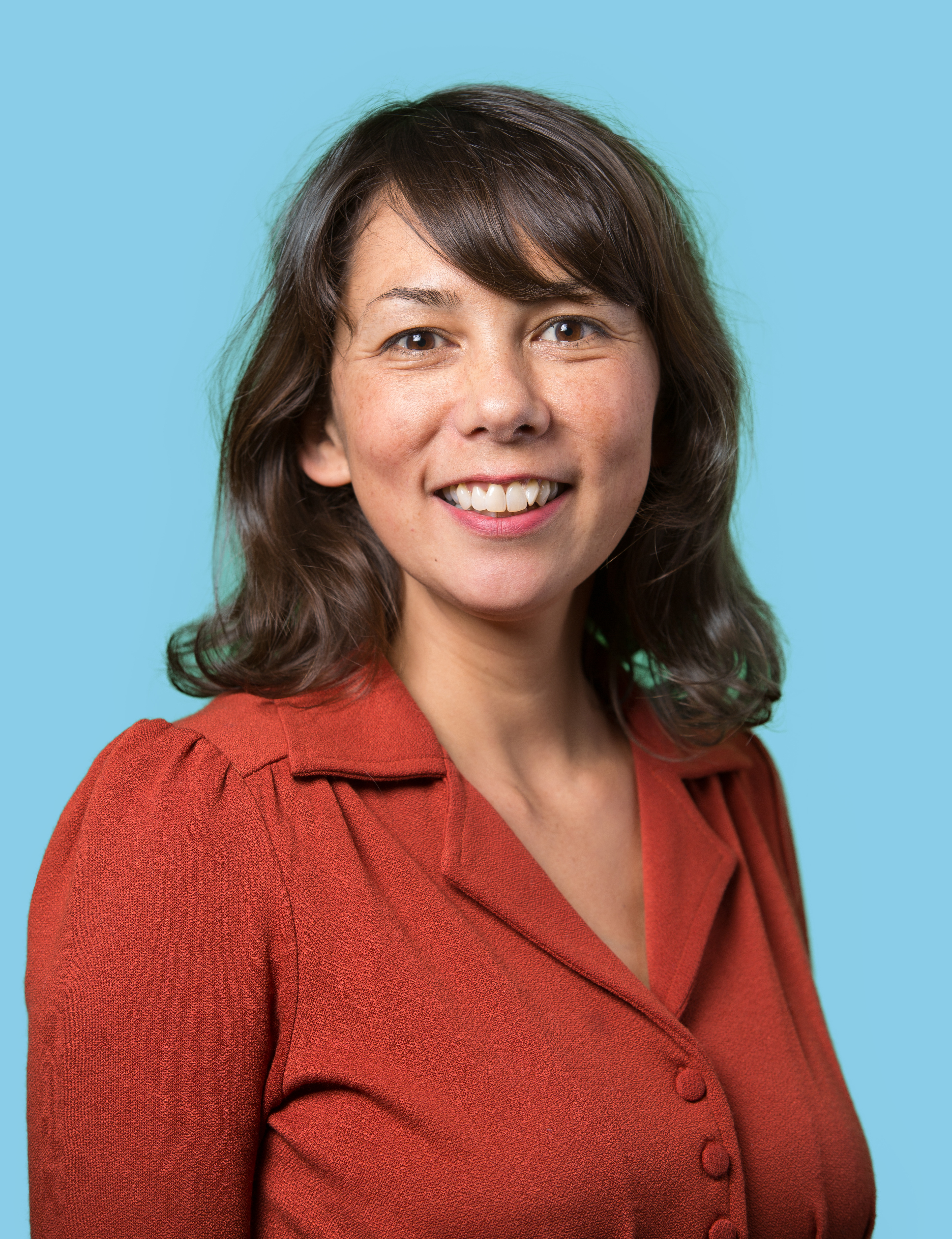 22 november 2016. Tweede Kamerlid voor de Partij van de Arbeid. Foto: Lex Draijer.